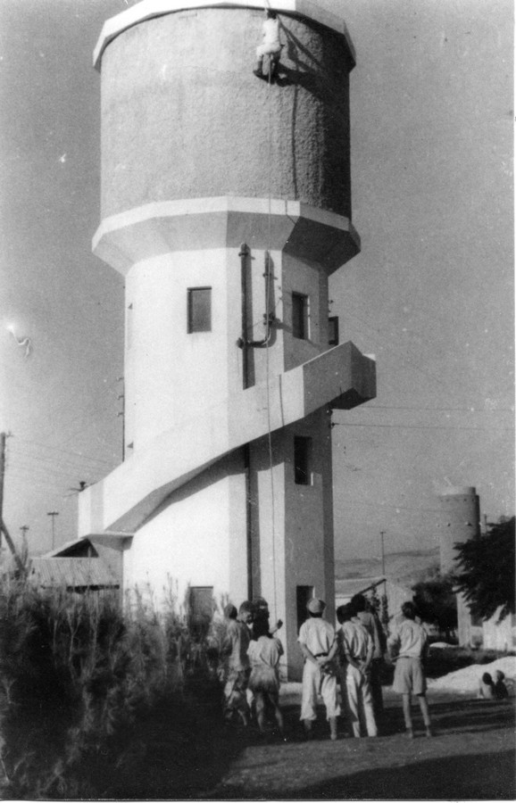 ראשונים תמיד אנחנו פלוגה א של הפלמ"ח א - הפלוגה עולה מהדרום השומם לעמק הירדן הפורח - אשדות-יעקב -קפיצה מראש מגדל הסילו